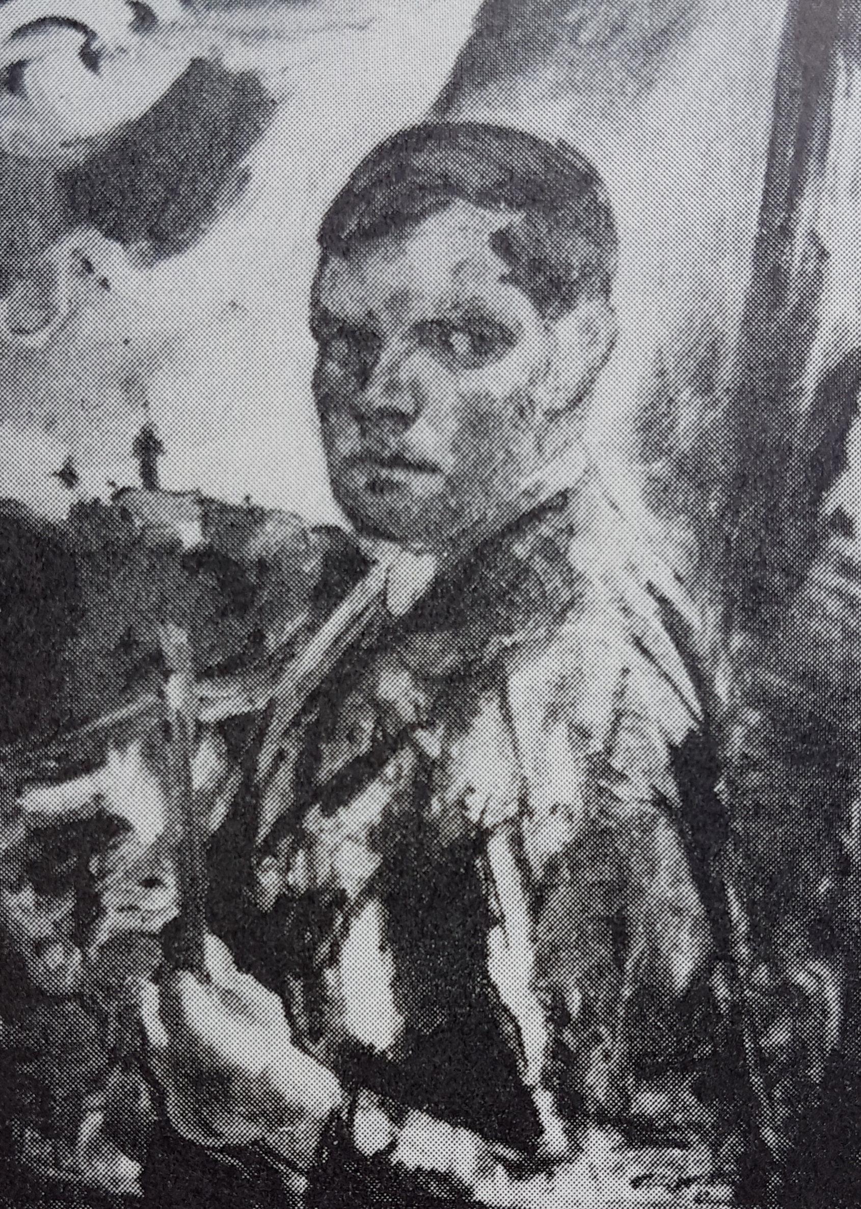 Emil Westman självporträtt 1929, avfotograferad porträttbild från Allhems Svenskt konstnärslexikon.